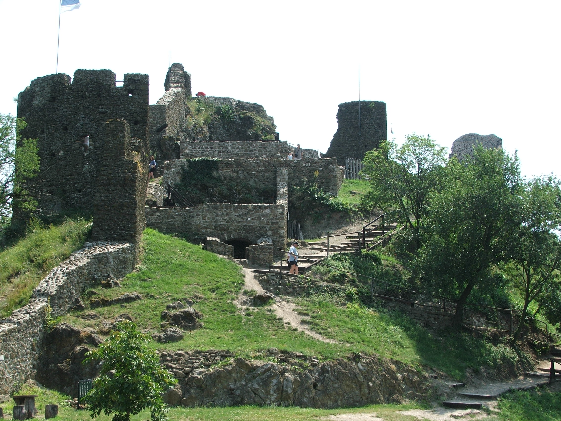 Szigliget, vár